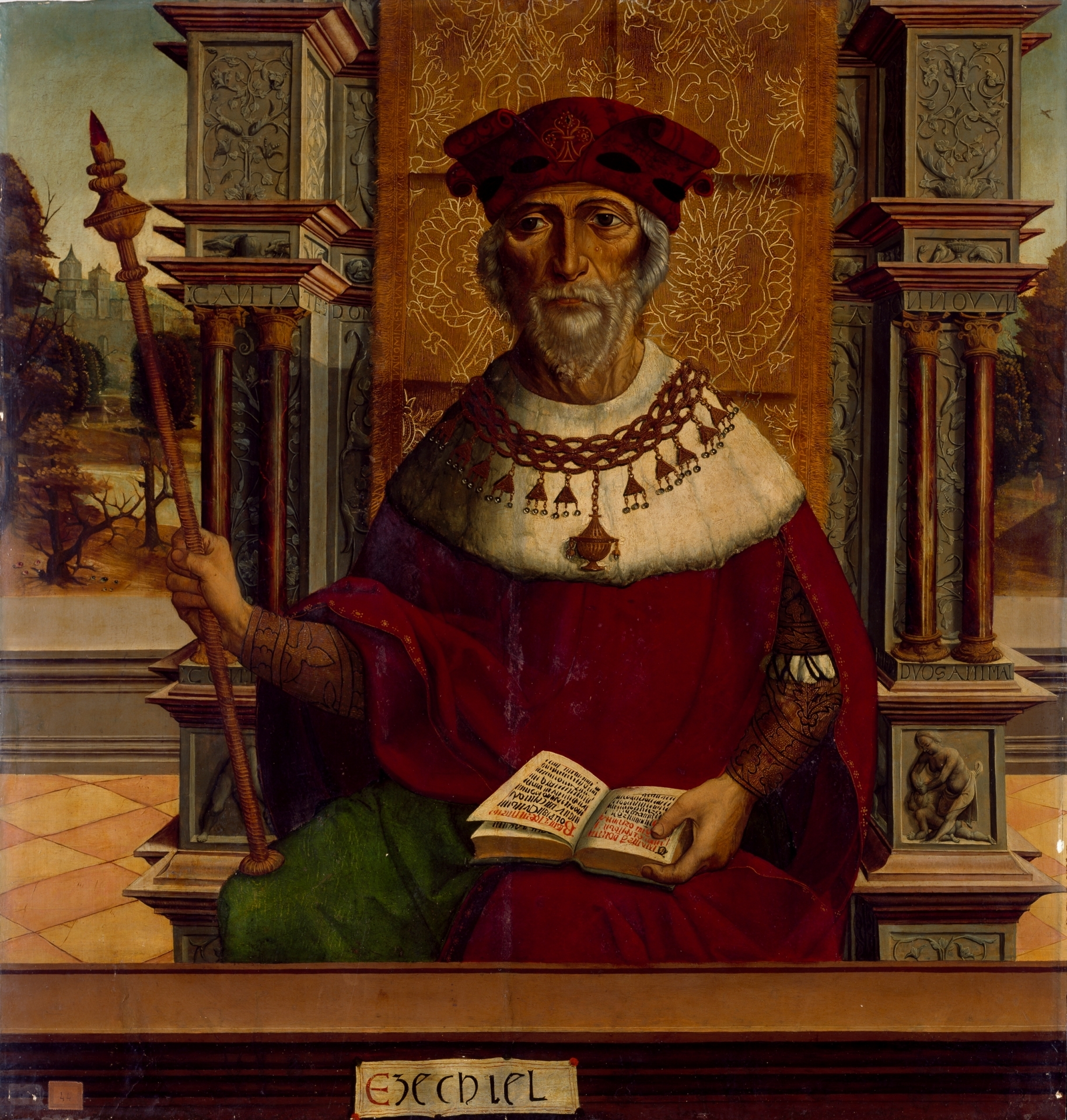 La obra representa al profeta hebreo Ezequiel.